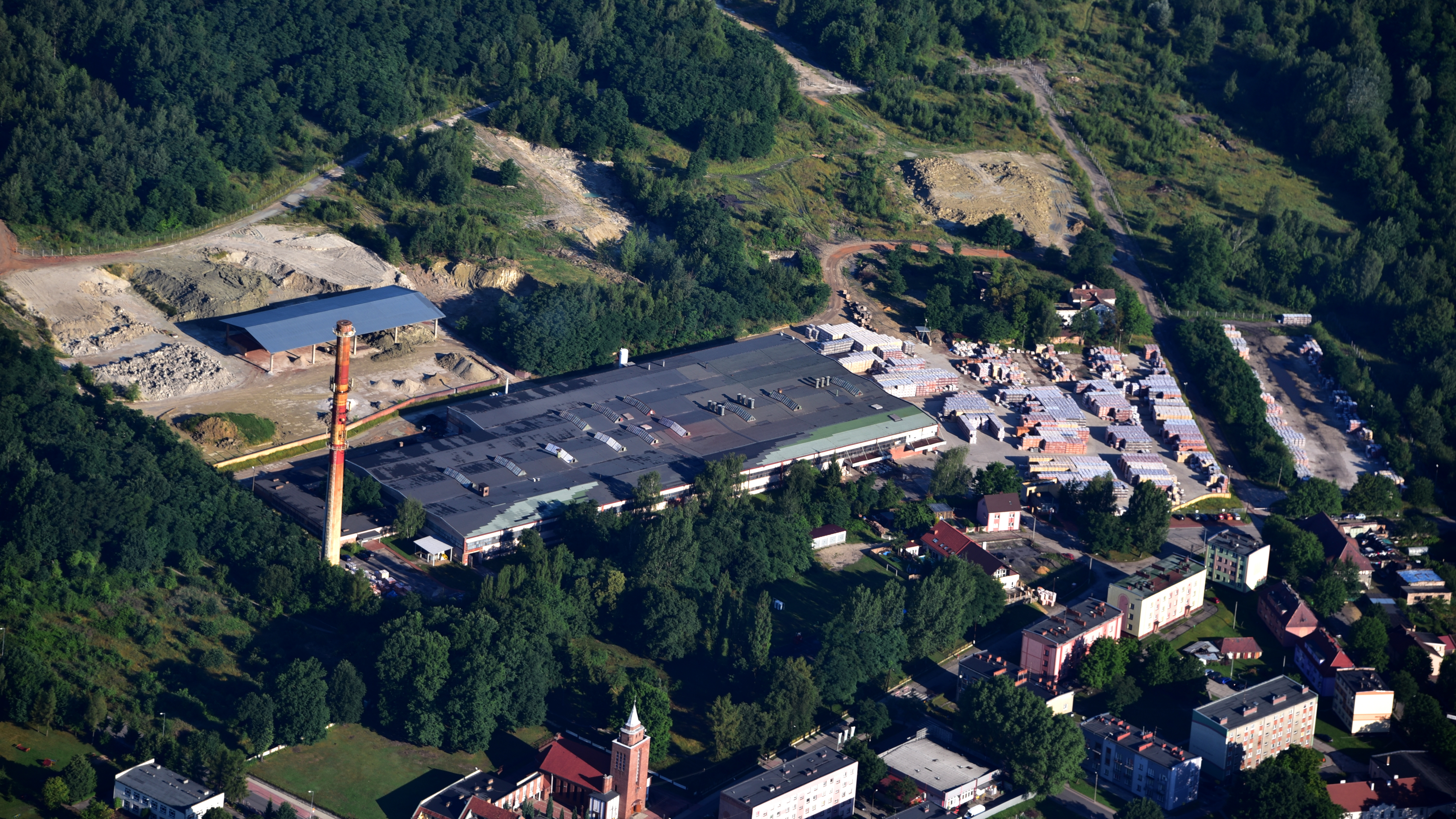 Gozdnica, Polen, Luftaufnahme (2017)